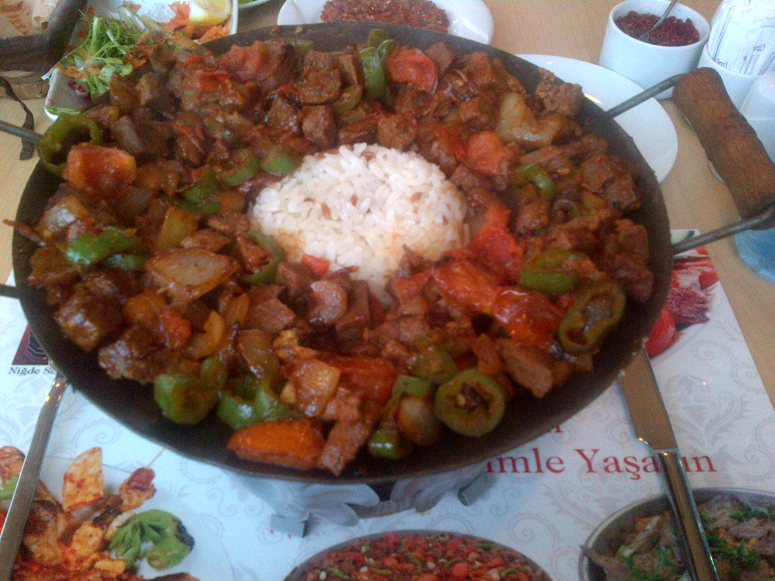 Çoban kavurma de carne de ternera.